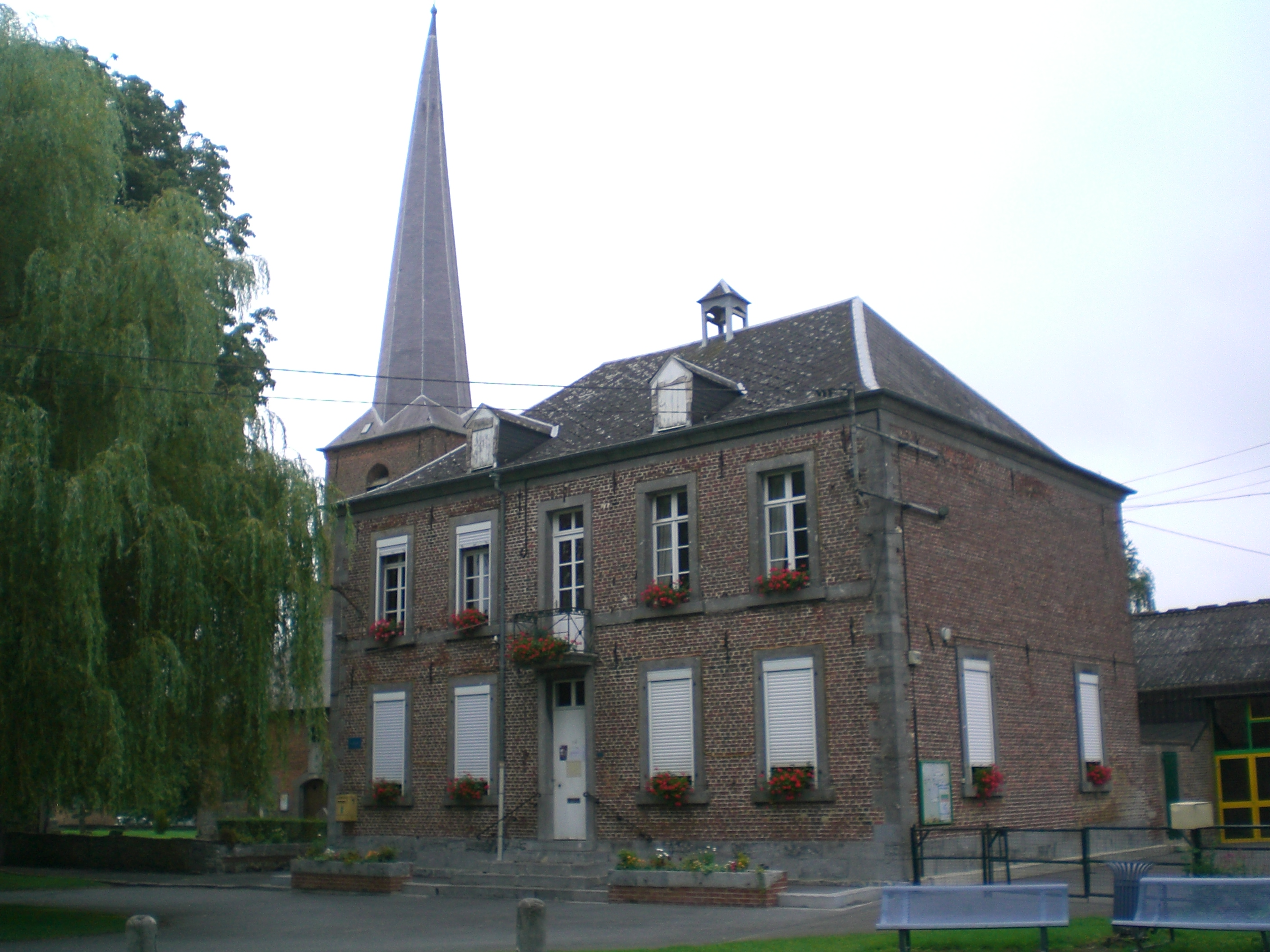 mairie Grand-Fayt nord france